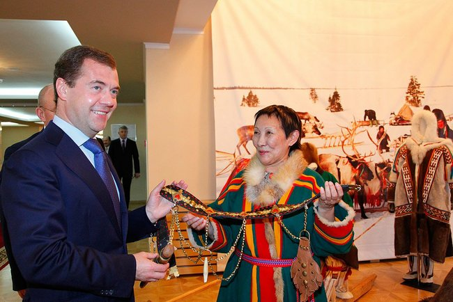 Перед заседанием президиума Государственного совета «О мерах по повышению качества предоставления жилищно-коммунальных услуг населению».